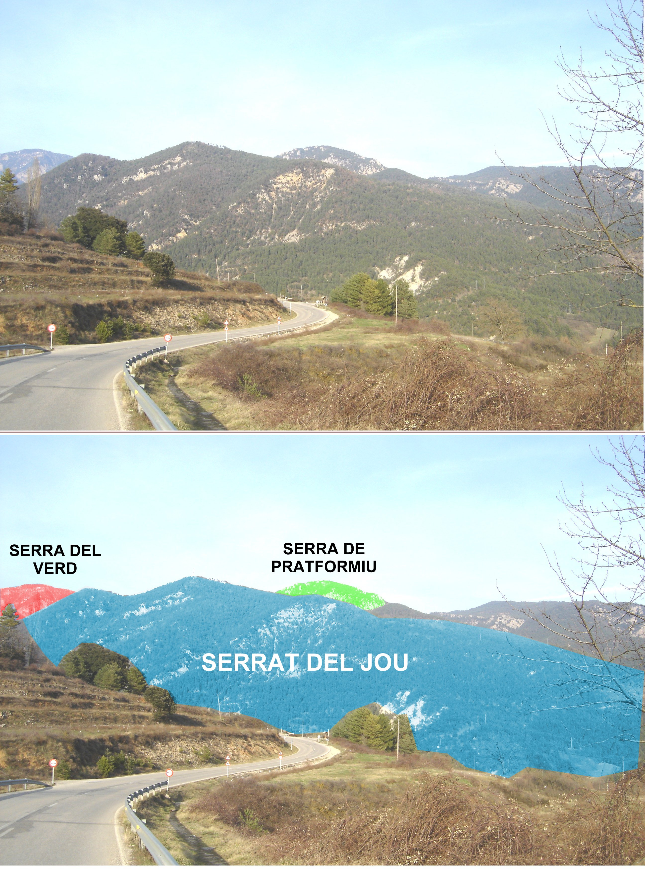 El vessant oriental del Serrat del Jou (La Coma i la Pedra, la Vall de Lord, Solsonès) vist des de la sortida deSant Llorenç de Morunys en direcció a la (vessant oriental). A la foto també es pot veure la Serra del Verd i la Serra de Pratformiu